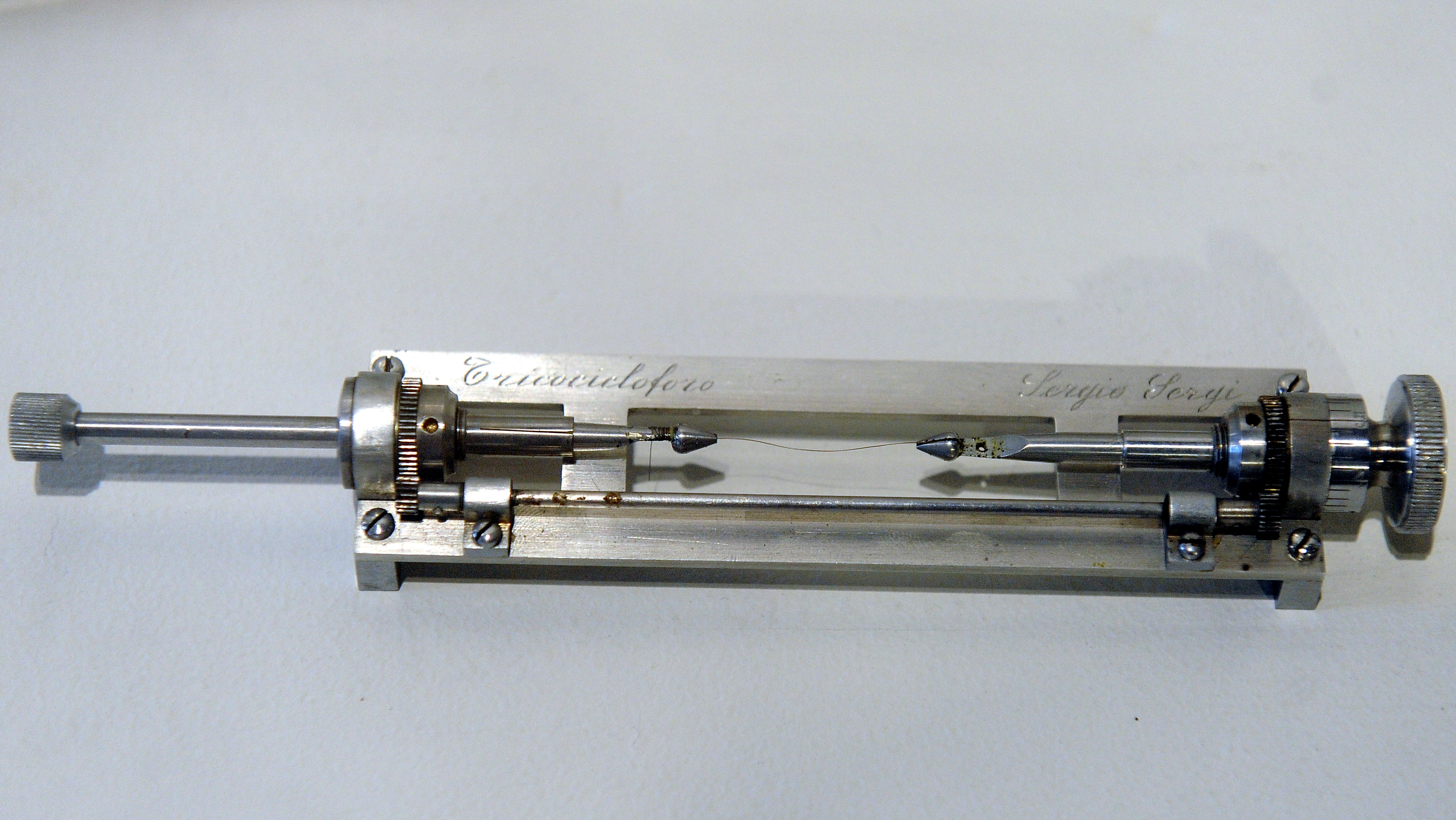 Tricocicloforo di Sergio Sergi . Mostra "Imago Animi. Volti dal passato". Palazzo Assessorile di Cles.